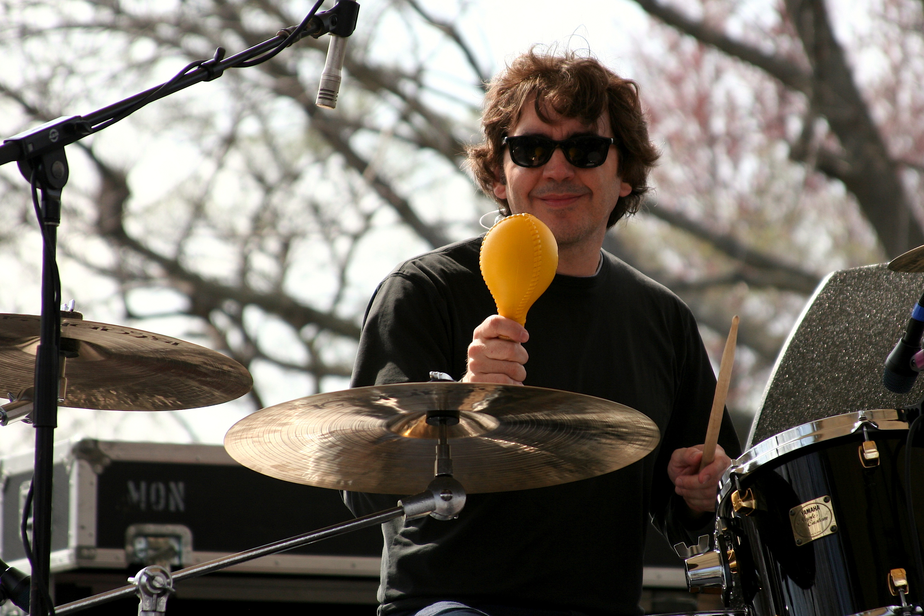 Jim Eno, Spoon drummer